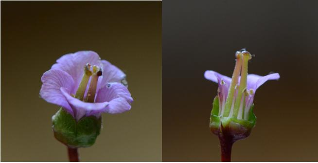 Bergenia crassifolia, fleur, coupe